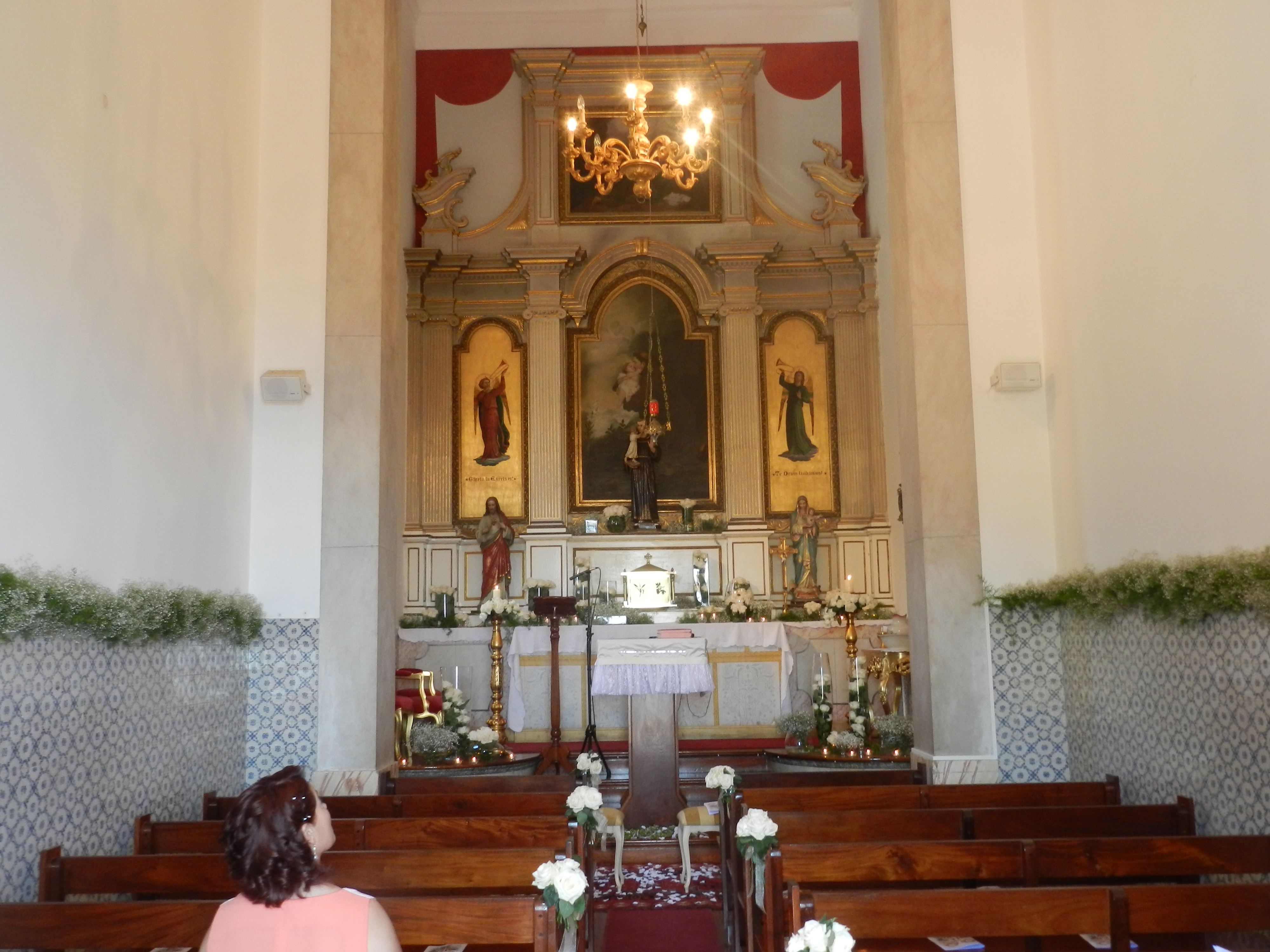 Interior da Capela de Santo António decorado para ocasião de casamento, altar-mor e retábulo pictórico (29/6/2013, autor: Higino Faria)